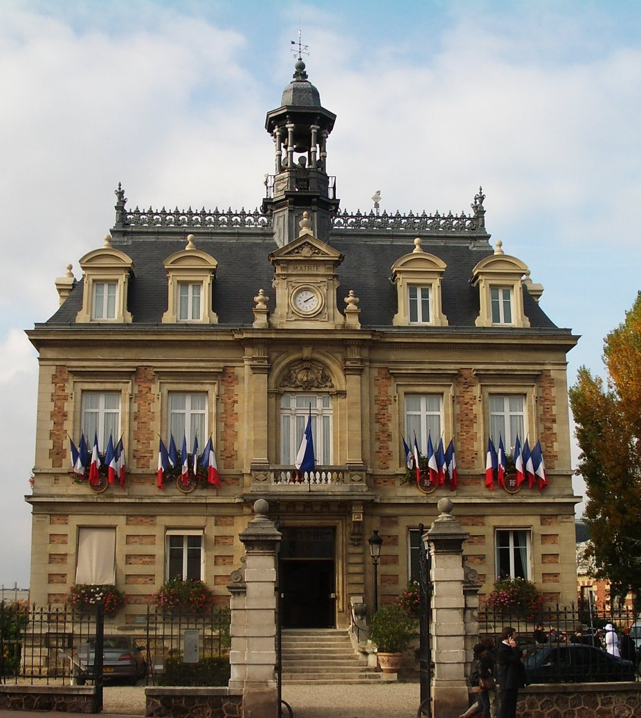 La marie de la ville de Maisons-Laffitte aux Yvelines, dans la région parisienne.